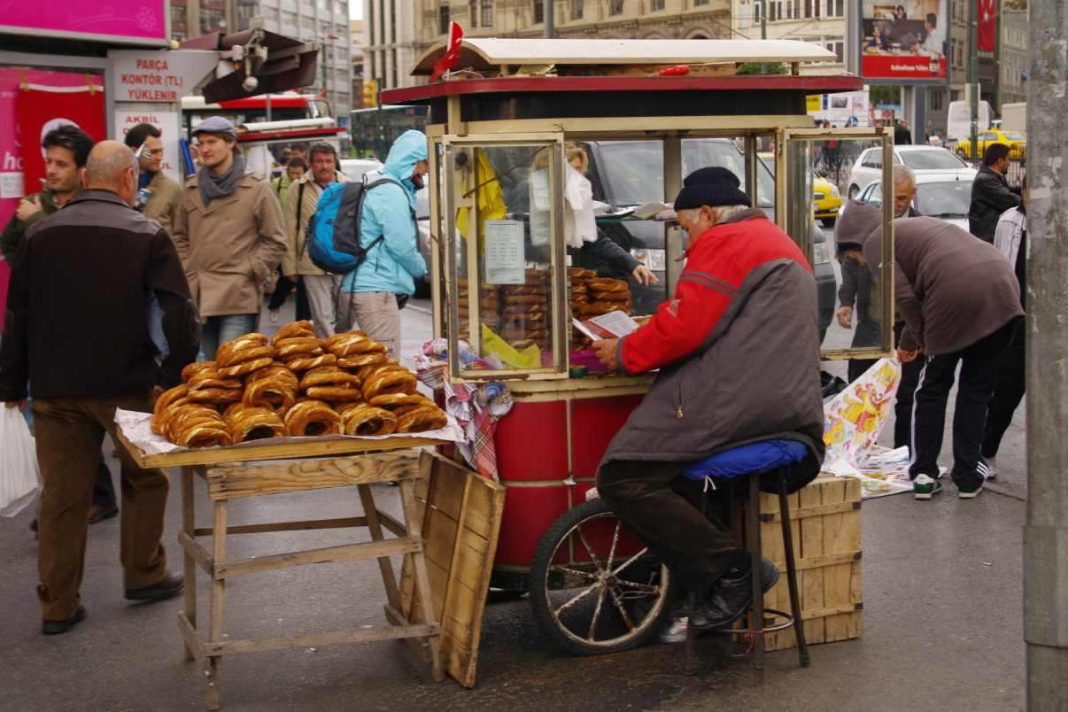 Simit Verkäufer